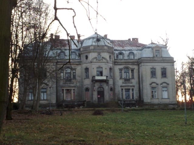 Widok pałacu od strony północnej.